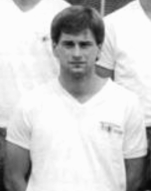 Title: Mannschaftsfoto 1. FC Union Berlin Factual corrections and alternative descriptions are encouraged separately from the original description. Additionally errors can be reported at this page to inform the Bundesarchiv. Original historic description: ADN-ZB-Mittelstädt-23.8.83-zin-Berlin: Die Mannschaft des 1. FC Union Berlin für die Fußball-Oberligasaison 1983-84. Vorn v.l.n.r.: Peter Riedtke, Torhüter Björn Dahms, Torhüter Wolfgang Gehrke und Bernd Quade. Mitte v.l.n.r.: Olaf Seier, Olaf Reinhold, Peter Wirth, Reiner Thomas und Ingo Kimmritz. Hinten v.l.n.r.: Henry Treppschuh, Mannschaftskapitän Lutz Möckel, Lutz Hovest, Holger Sattler, Heiko Lahn, Uwe Borchardt und Lutz Hendel.